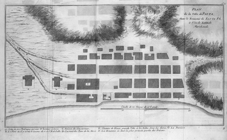 [Illustrations de Voyage autour du monde] Auteur : George Anson Éditeur : Henri-Albert Gosse et Compagnie (Genève) 1750